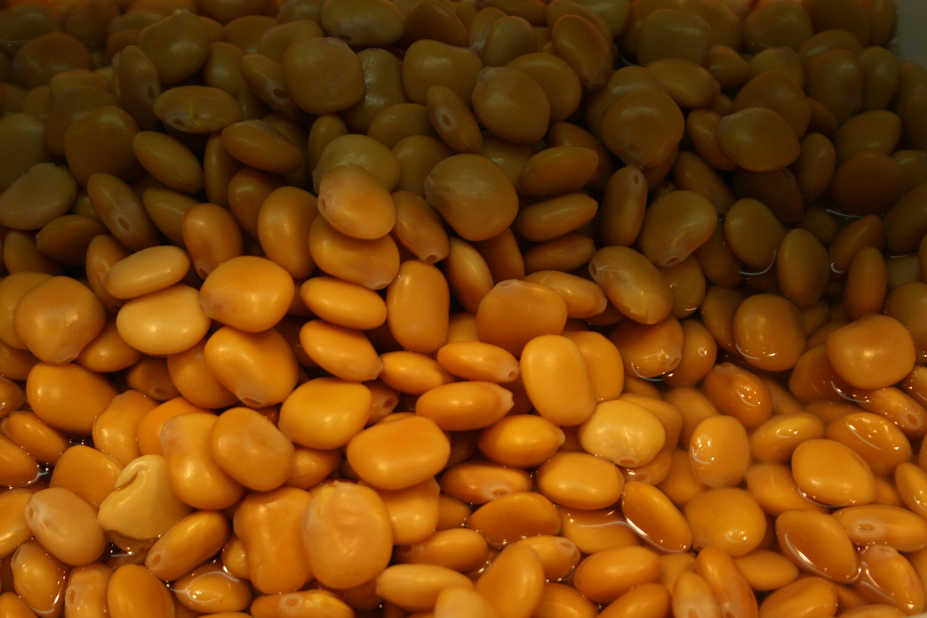 altramuces - Entremozos